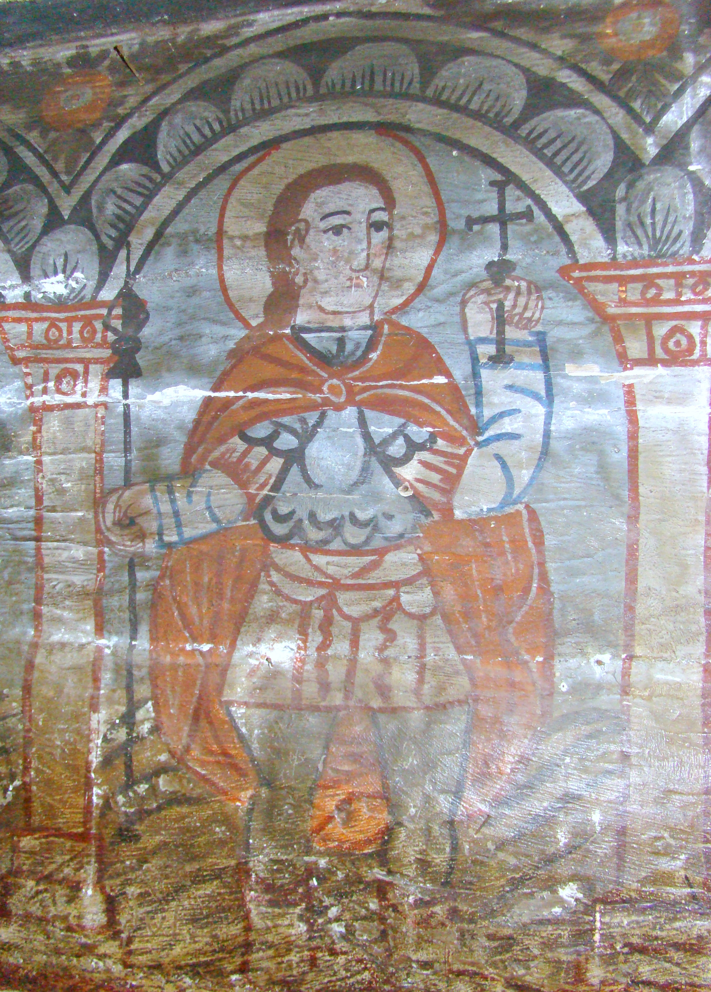 Biserica de lemn din Agârbiciu, județul Cluj